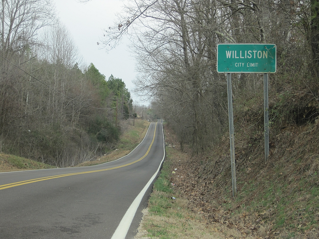 Williston, Tennessee